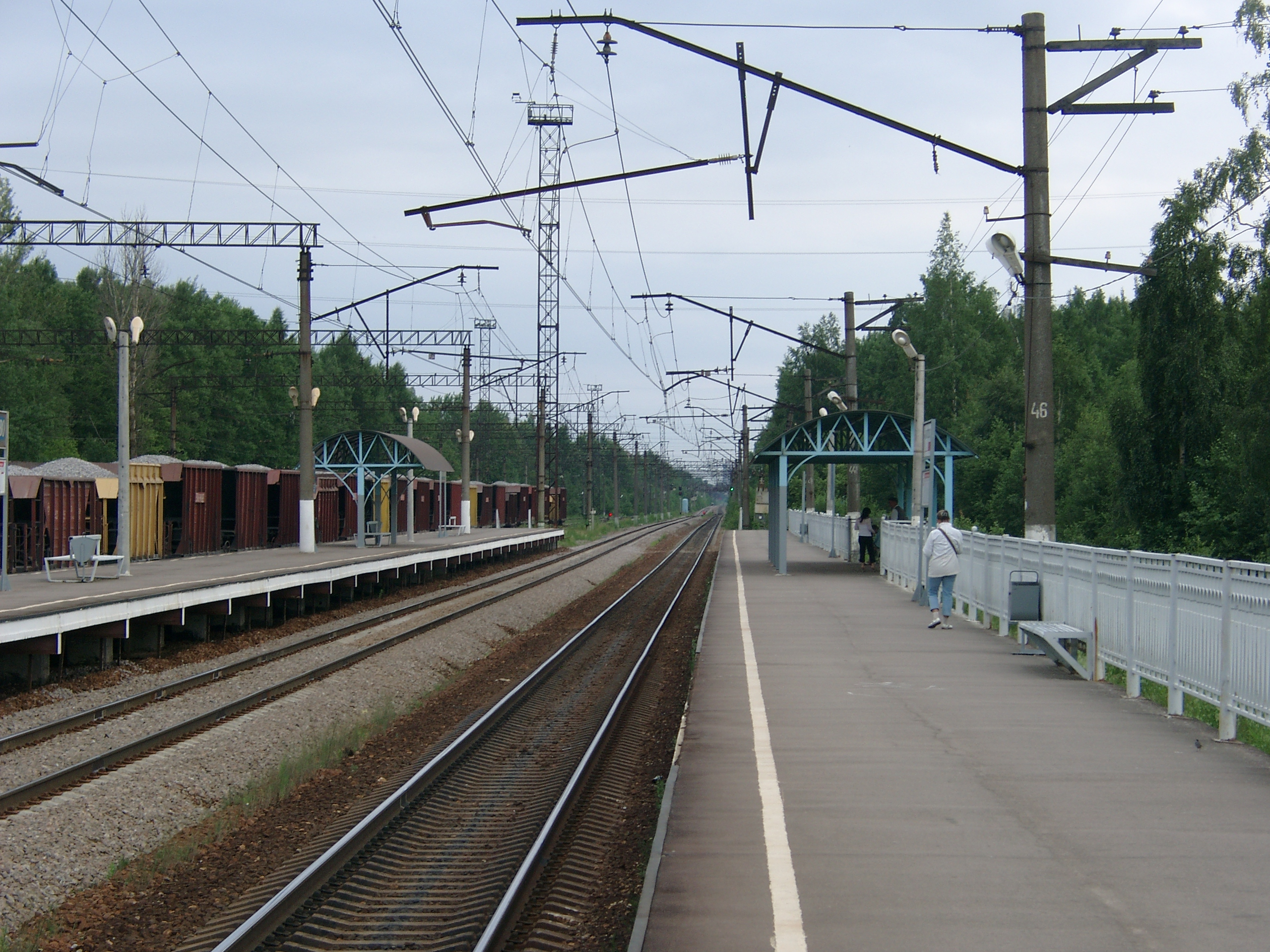 Станция Капитолово. Вид в южном направлении